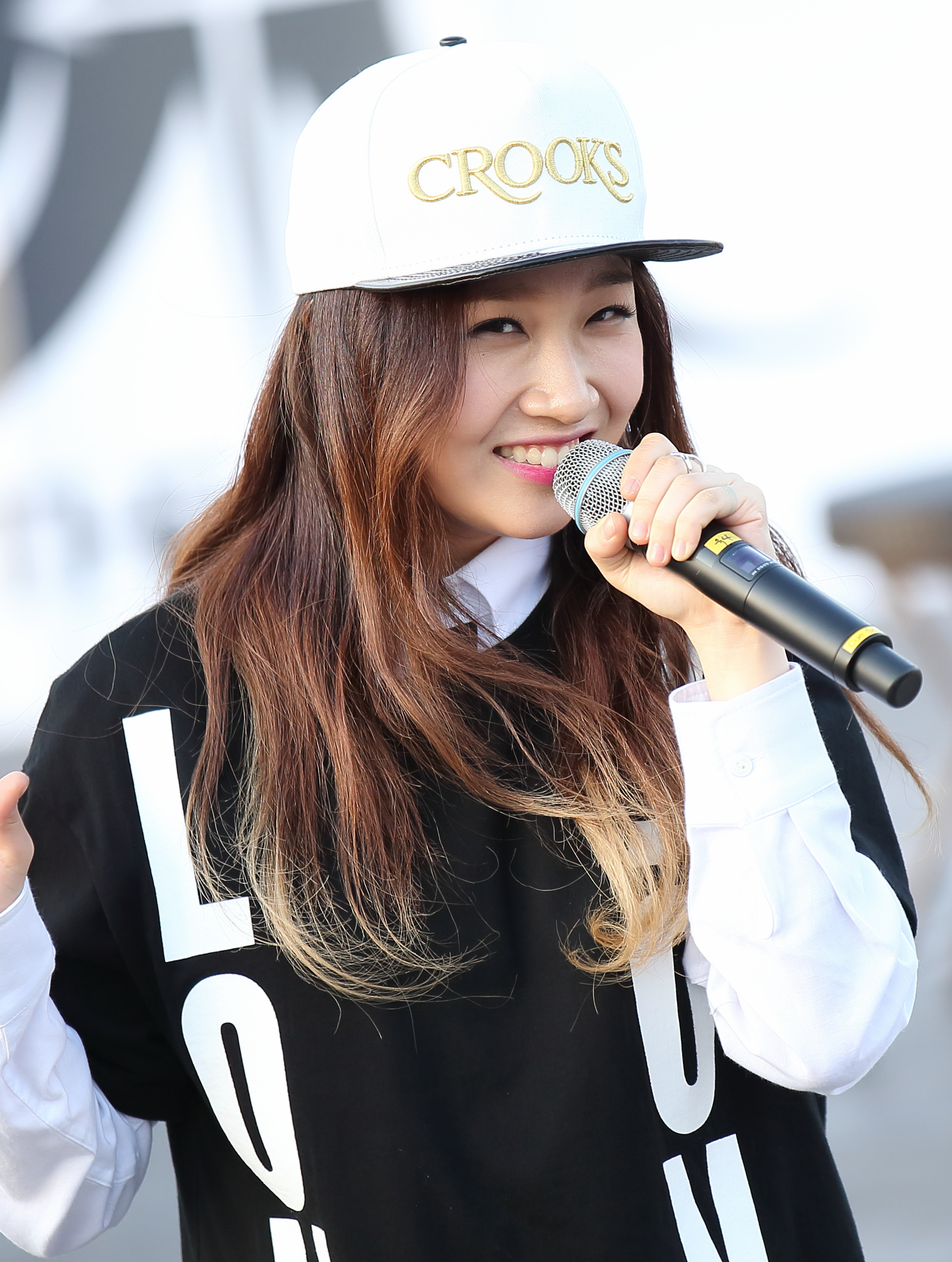 150516 여의도한강공원 버스킹 직찍